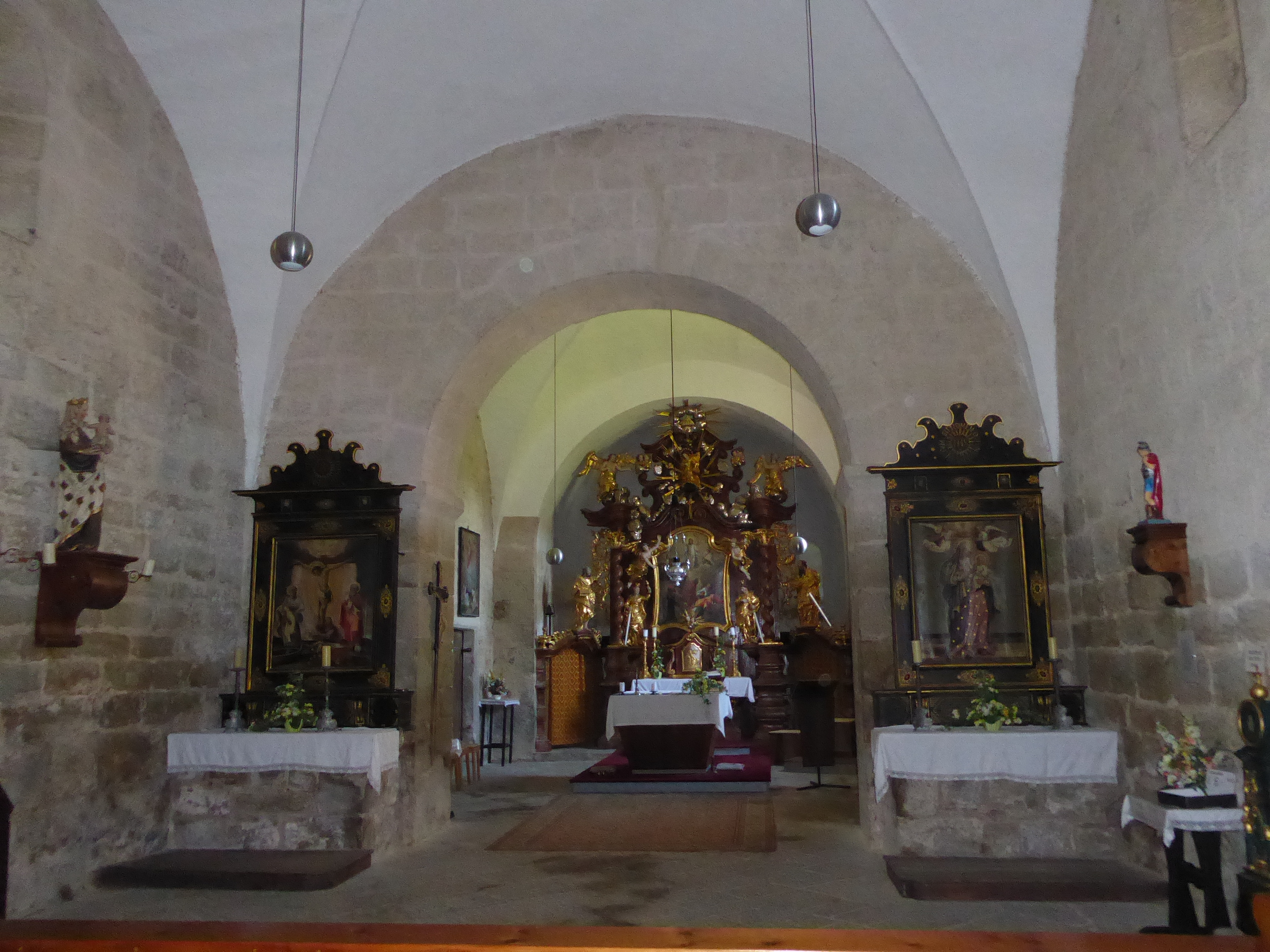 Filialkirche hll. Petrus und Paulus, Altweitra, Unserfrau-Altweitra, Niederösterreich - Innenansicht